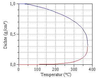 Dichte von Wasser und Wasserdampf im Phasengleichgewicht